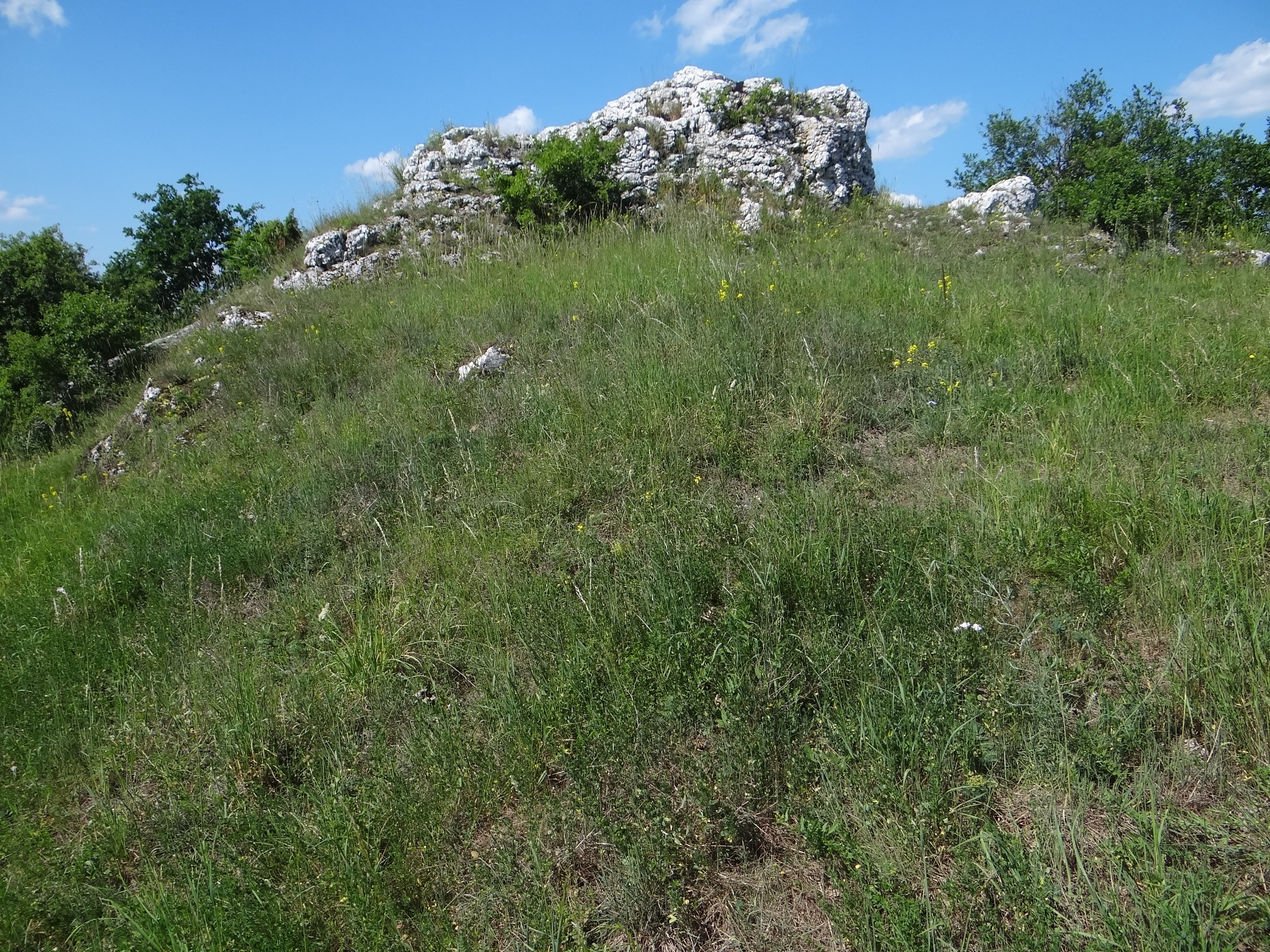 Szczyt wzniesienia Sołtysa Góra w Ryczowie